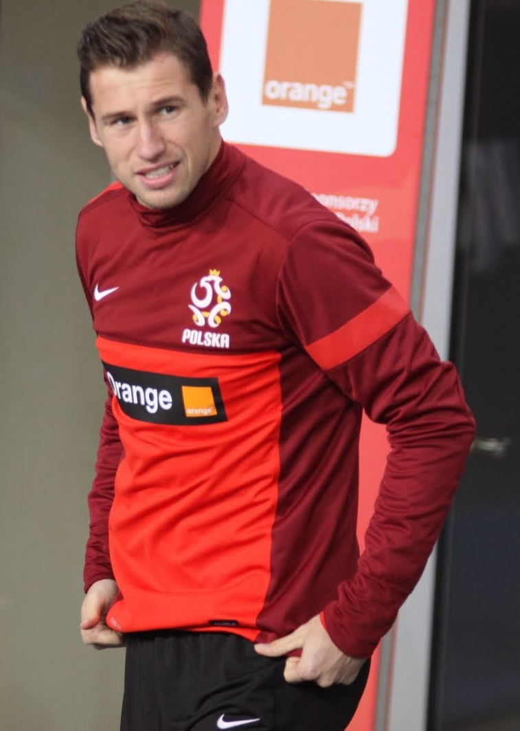 Grzegorz Krychowiak na treningu reprezentacji Polski.